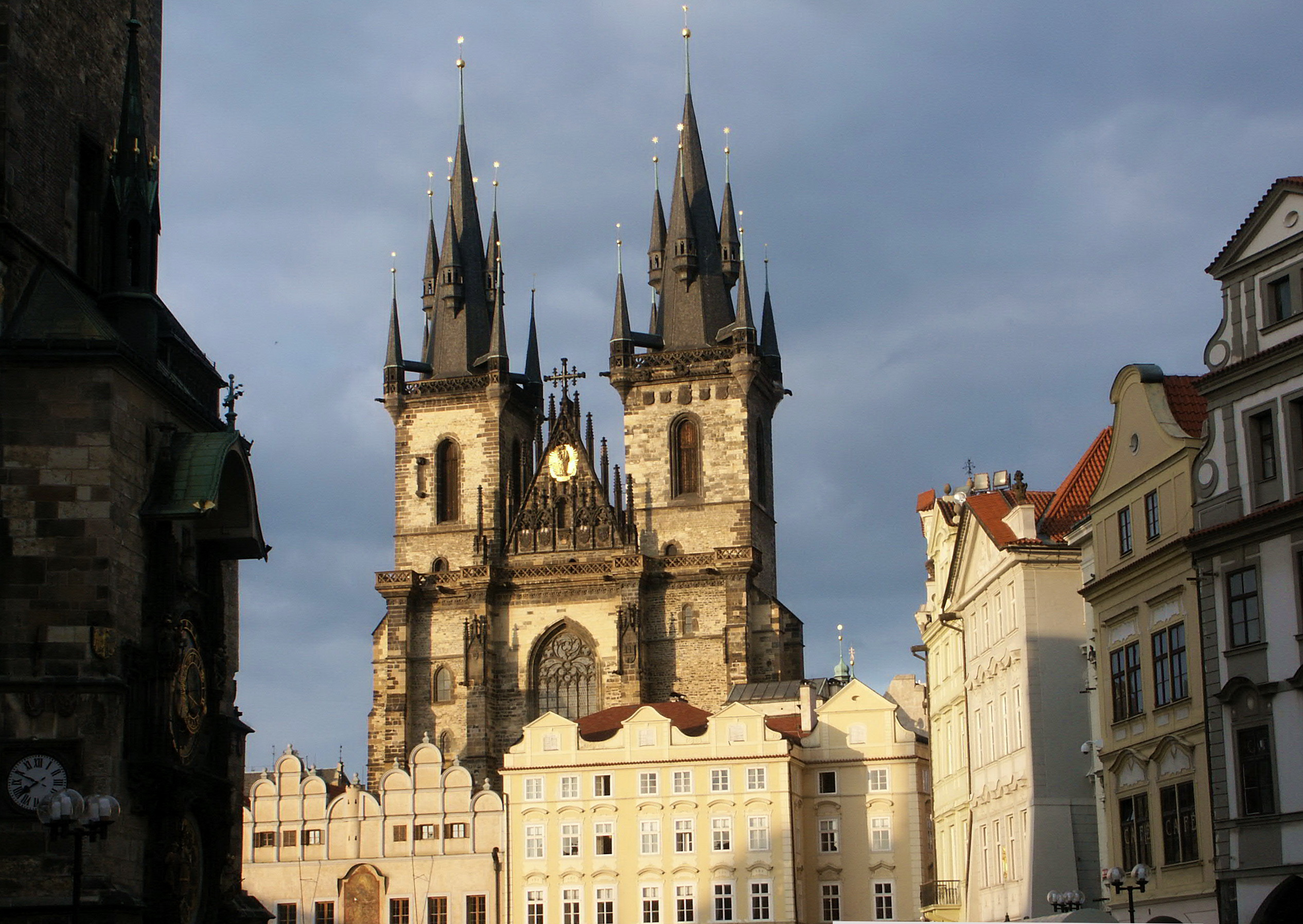 Kostel Matky Bozi pred Tynem 泰恩教堂